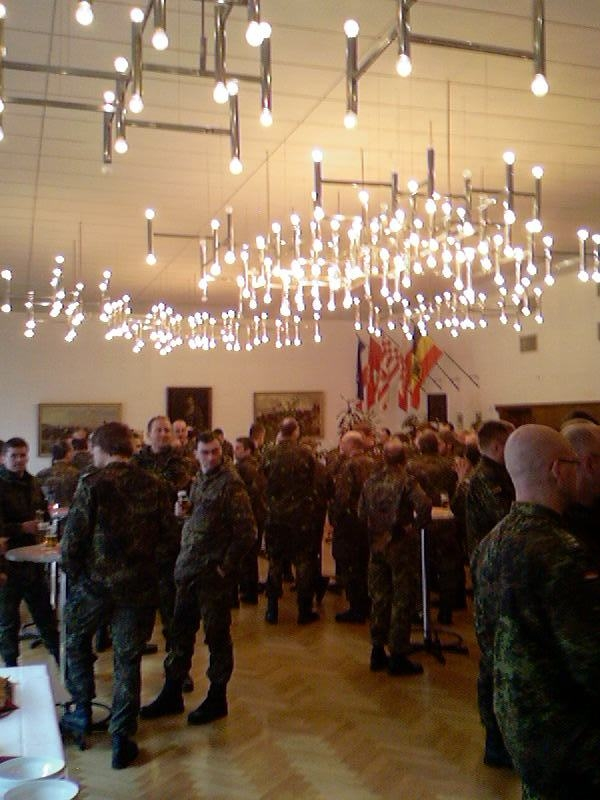 Fürstensaal im Offizierskasion der Generalfeldmarschall-Rommel-Kaserne